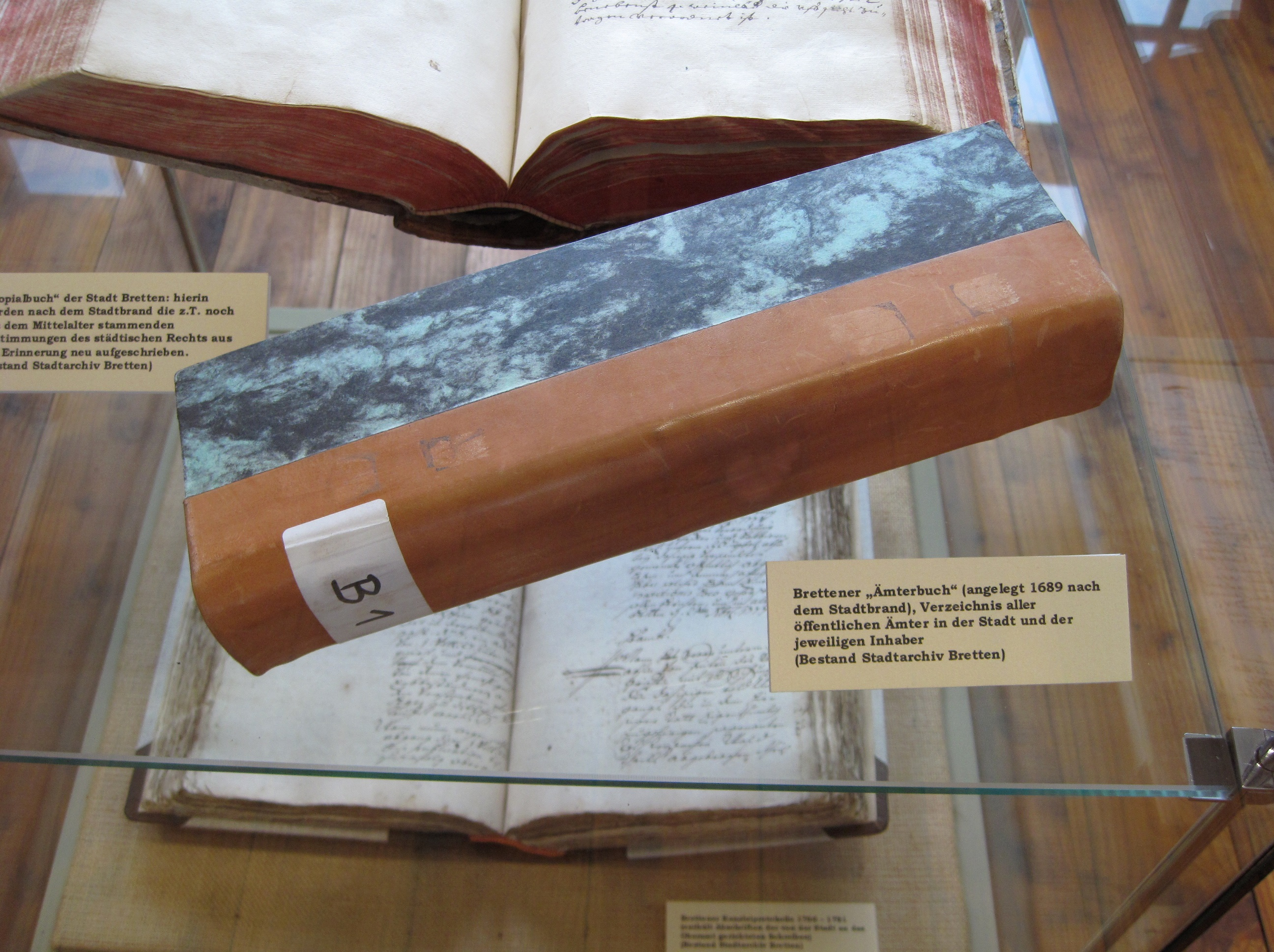 Ausstellungsstück im Stadtmuseum im Schweizer Hof, Eingang Engelsberg 9 in Bretten.